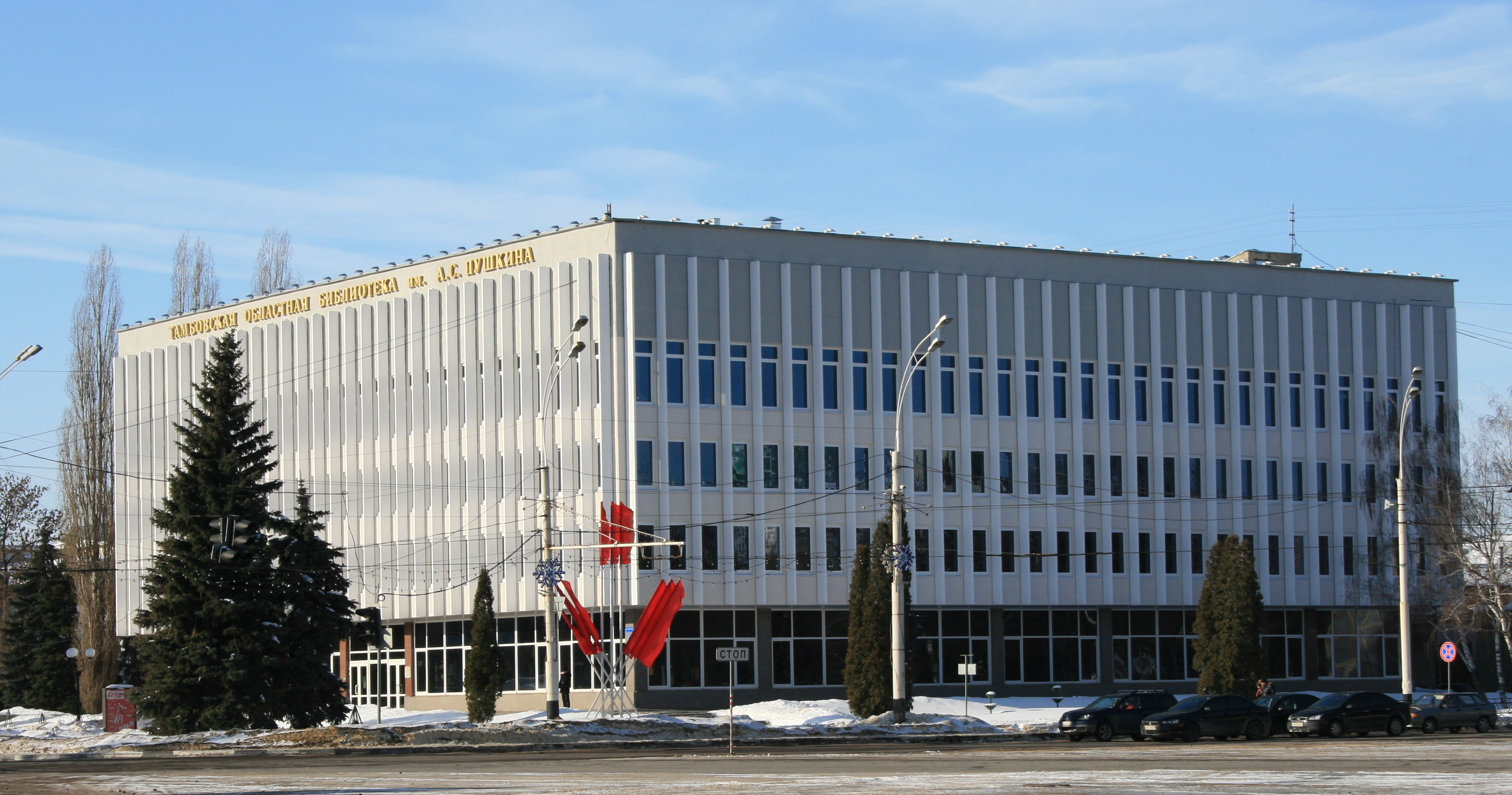 Тамбовская областная универсальная научная библиотека им. А. С. Пушкина. Вид с Ленинской площади.